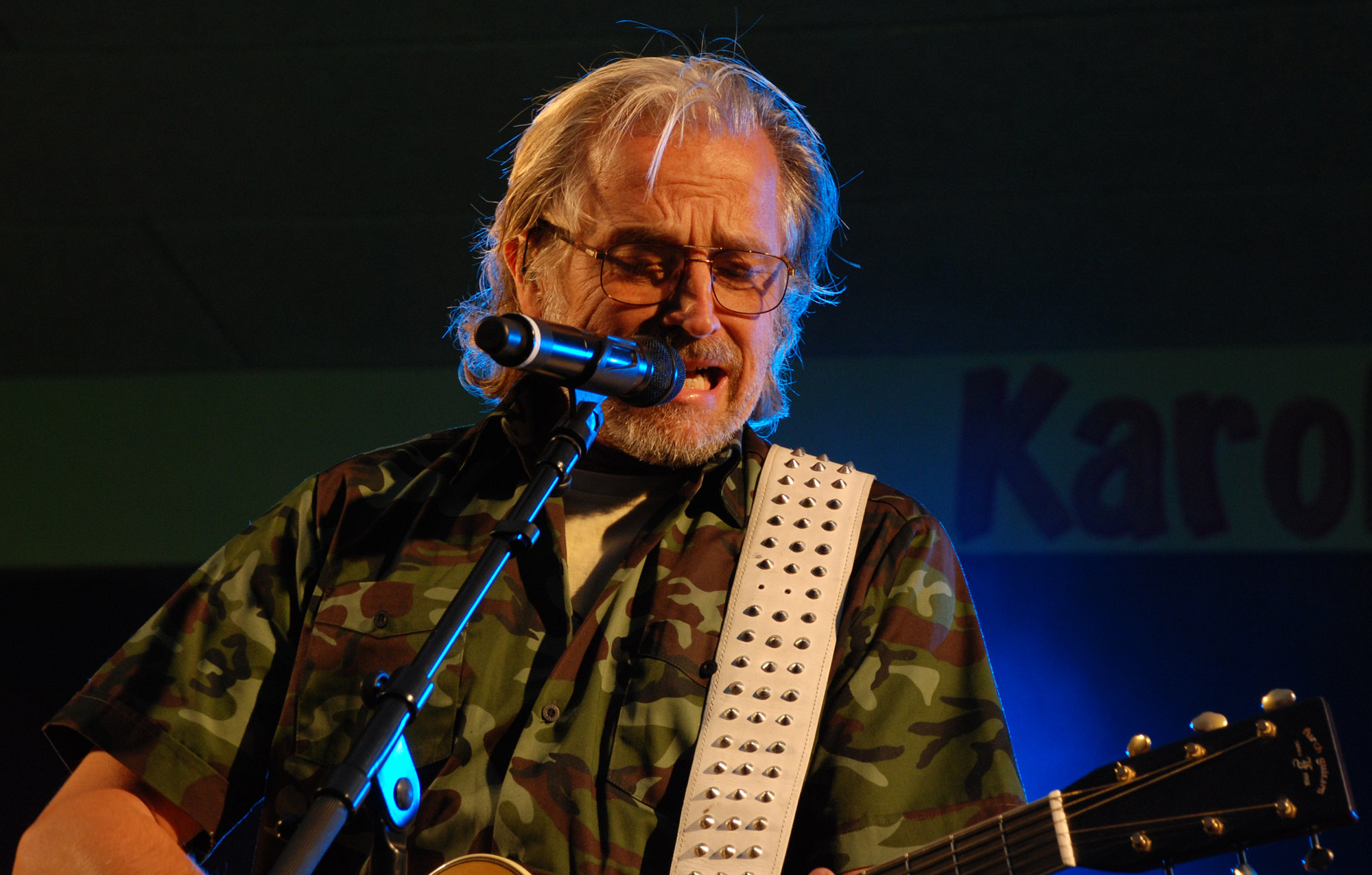 Lars H.U.G under koncert i Karolinelund (tivoli) i Aalborg